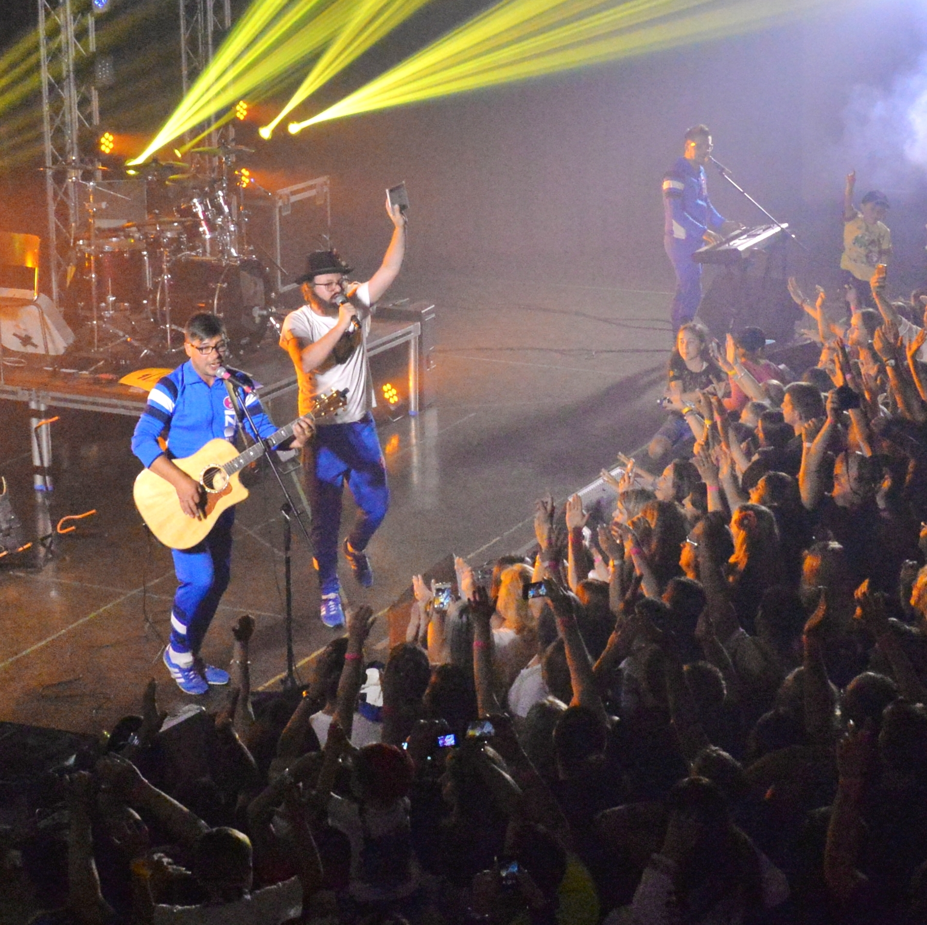 Концерт гурту DZIDZIO в Торонто 3 липня 2015 року